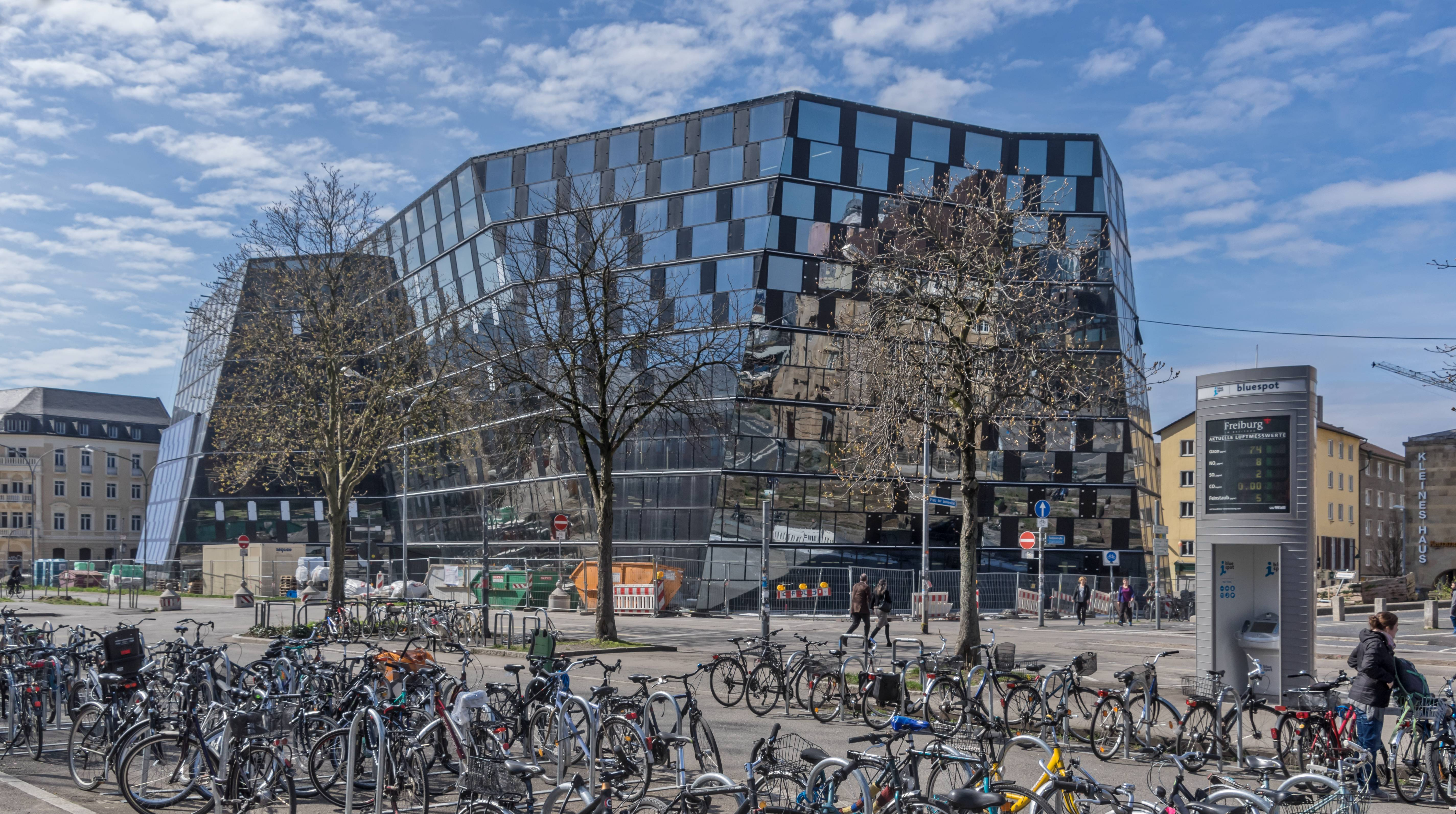 Bilder aus Freiburg im Breisgau Die neue Unibibliothek mit Sonnensegel am 28. 03. 2015